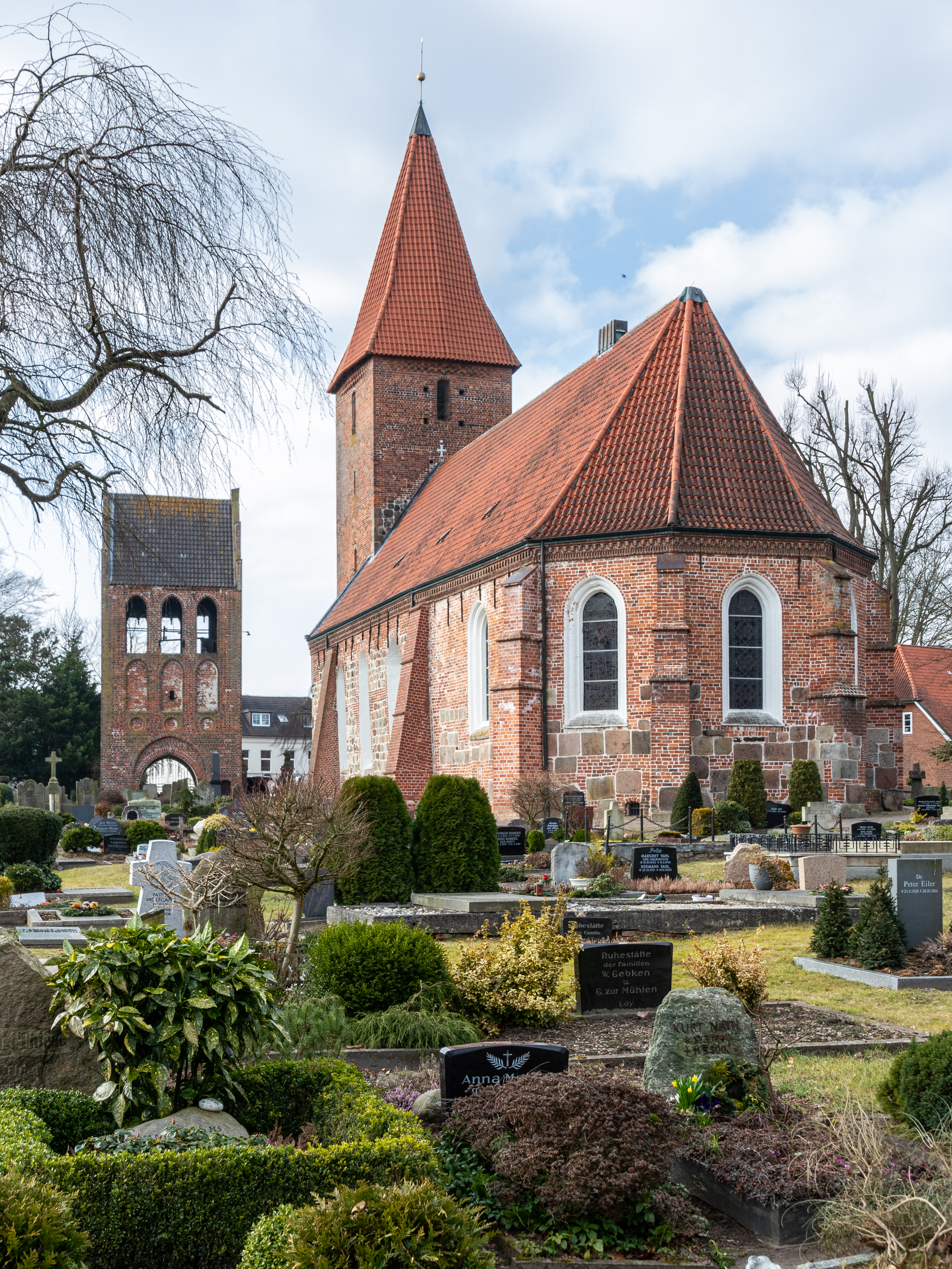 Kirche St. Ulrich mit frei stehendem Glockenturm in Rastede